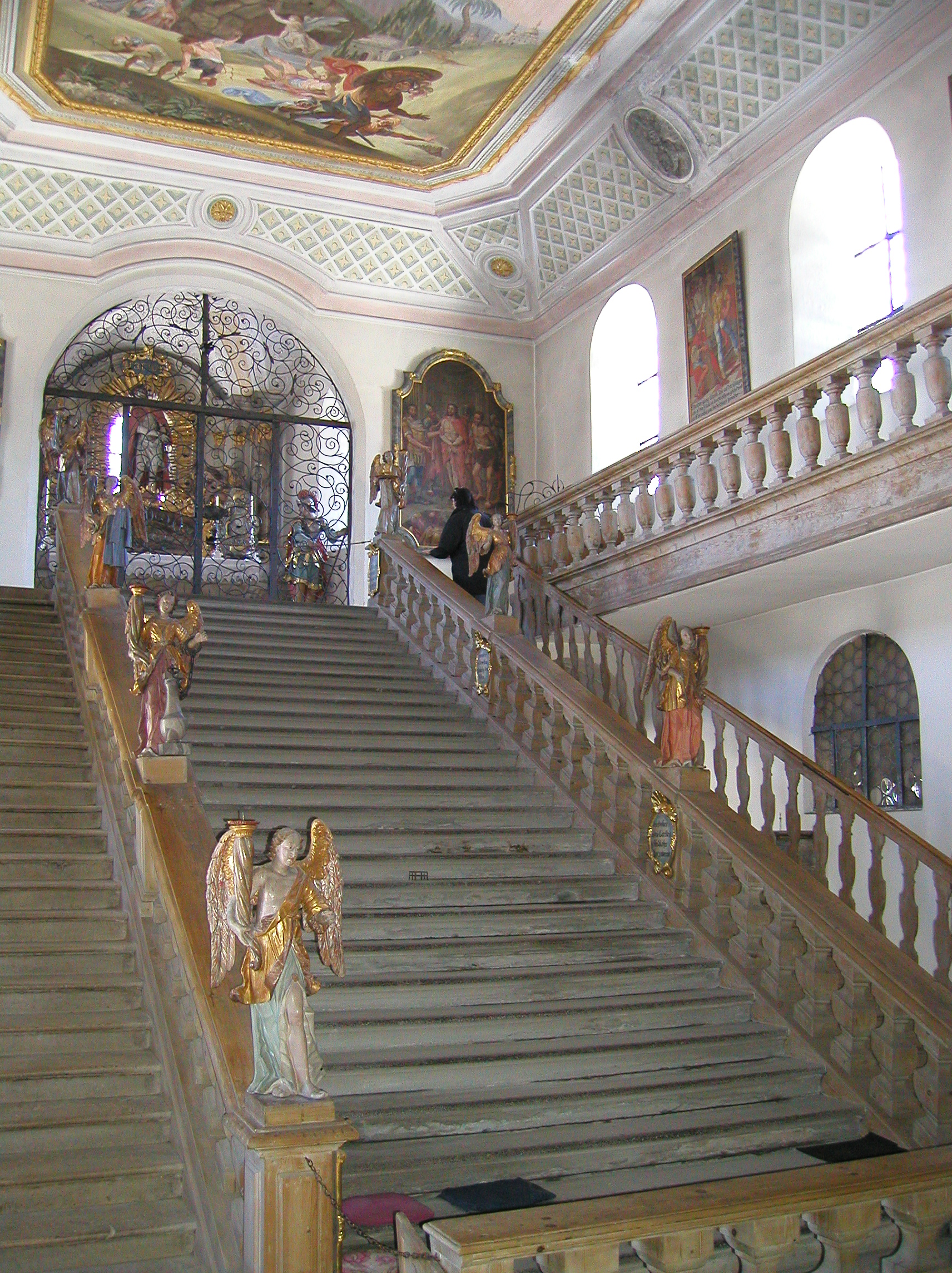 Heilige Stiege (Nachbildung der Scala Santa), Kalvarienbergkirche Bad Tölz